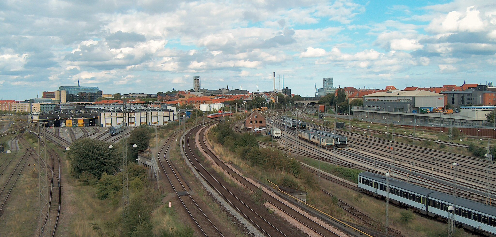 Århus set fra Ringgadebroen